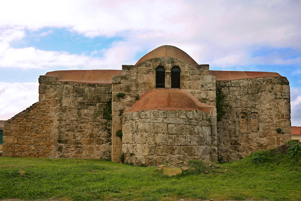 Chiesa di San Giovanni di Sinis, abside con bifore